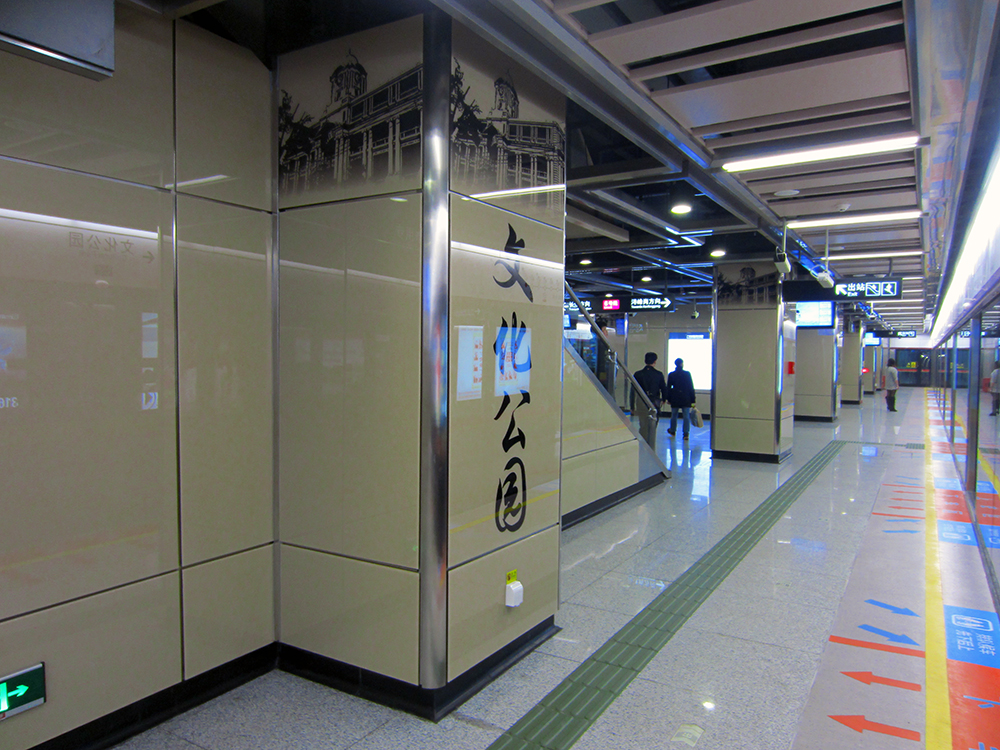 文化公園站6號線月台